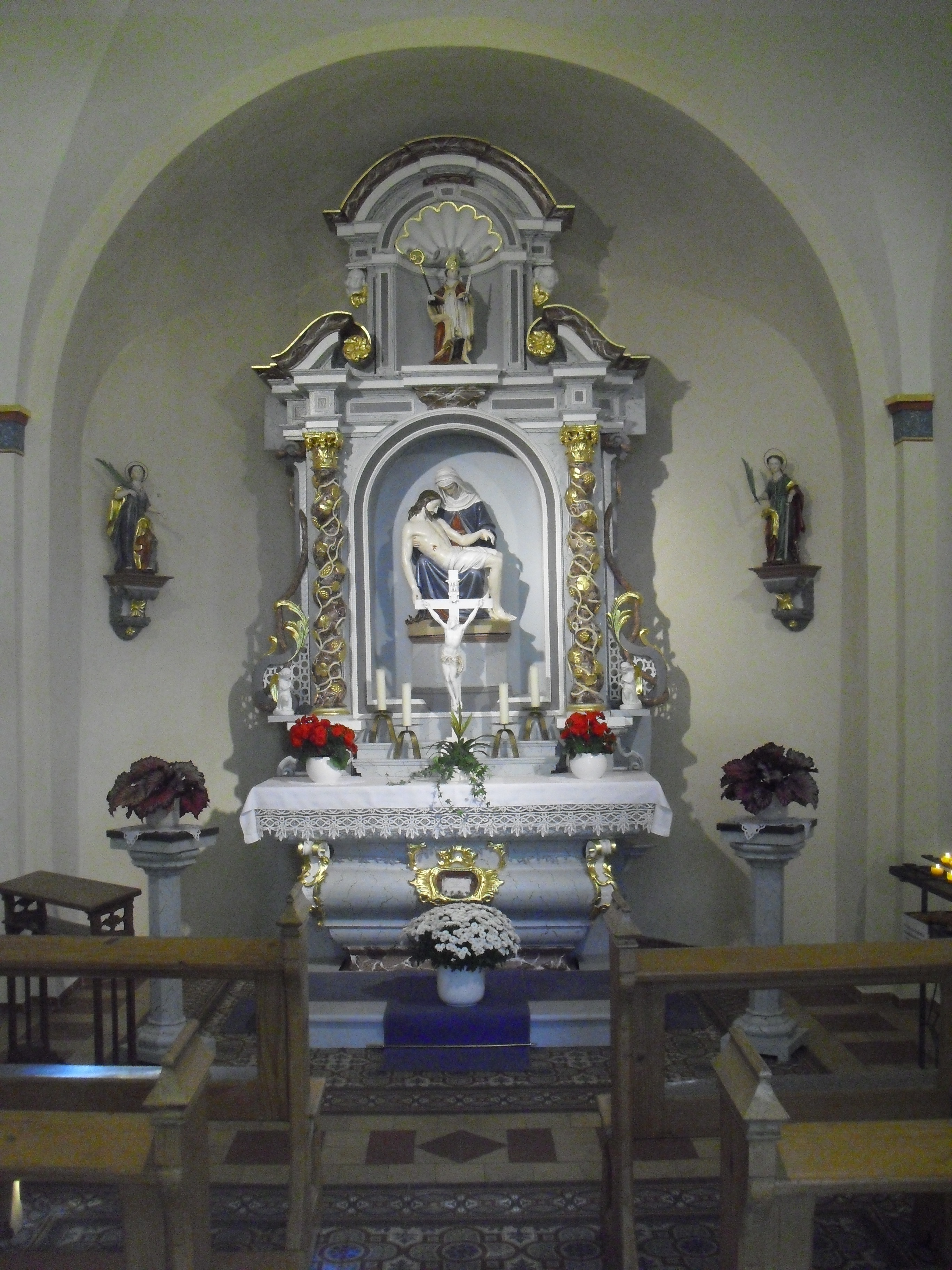 Altar in der Lindenkapelle in Bad Lippspringe. Der Barockaltar stand ursprünglich in der Busdorfkirche in Paderborn.